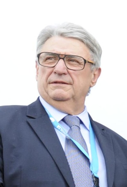 Bertrand Auban au Salon du Bourget 2013